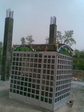 مرقد امامزادگان حوریه خاتون و کاظمه خاتون نوادگان امام سجاد(ع) در روستای سینقان